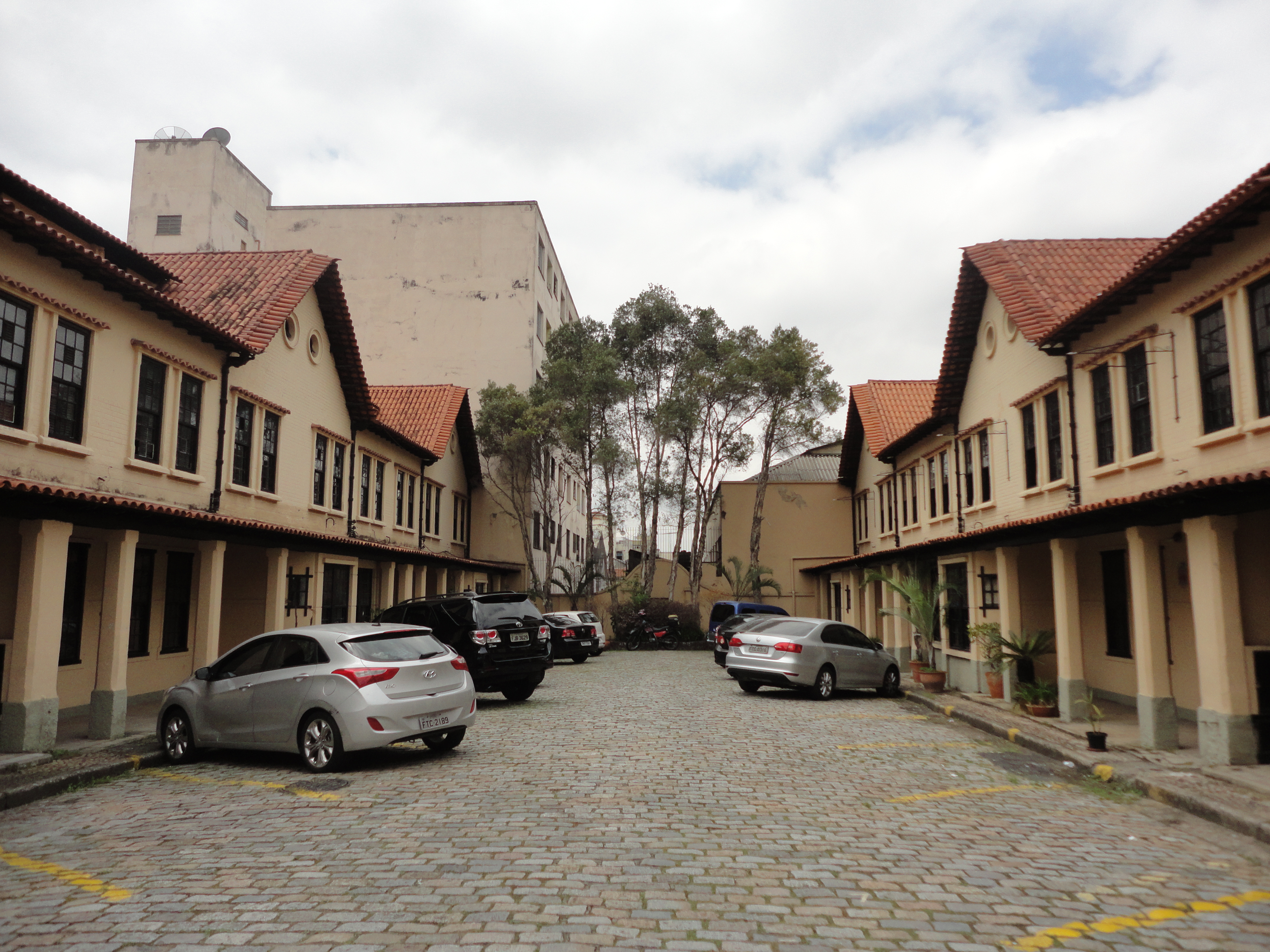 Detalhe do pátio da Vila dos Ingleses, em São Paulo (SP), Brasil.